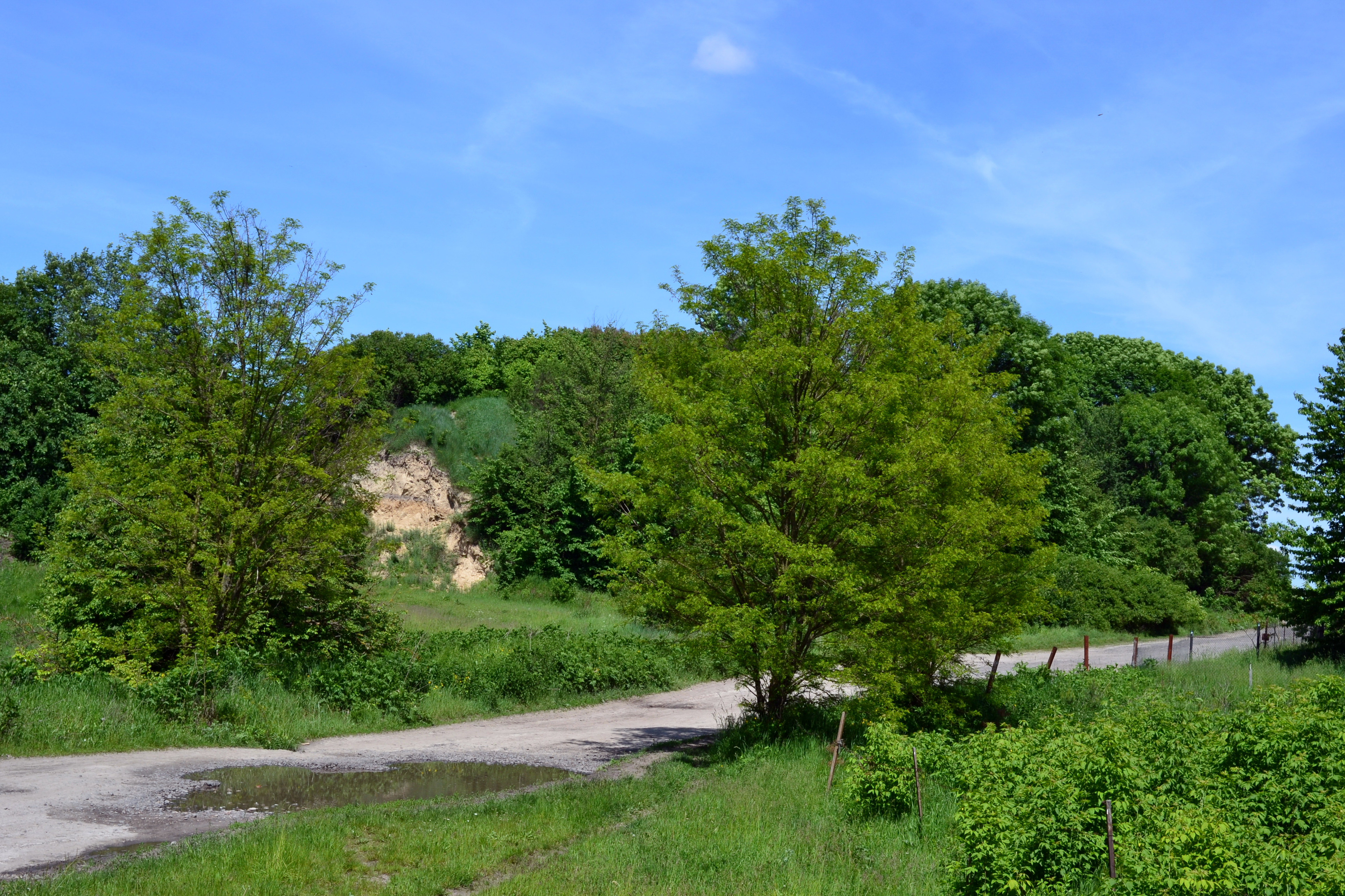 Городище (IX - XIII століття) - вигляд з півдня - Шепель (на західній околиці села, в урочищі «Вал», на високому мисі правого берега Серни, над заболоченою низовиною) Луцький район Волинська область Україна